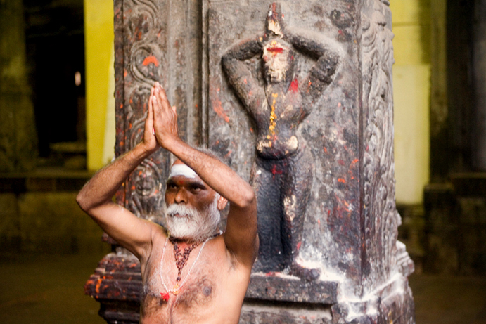 A sadhu performing namaste (W:Anjali mudra) in Madurai, India.